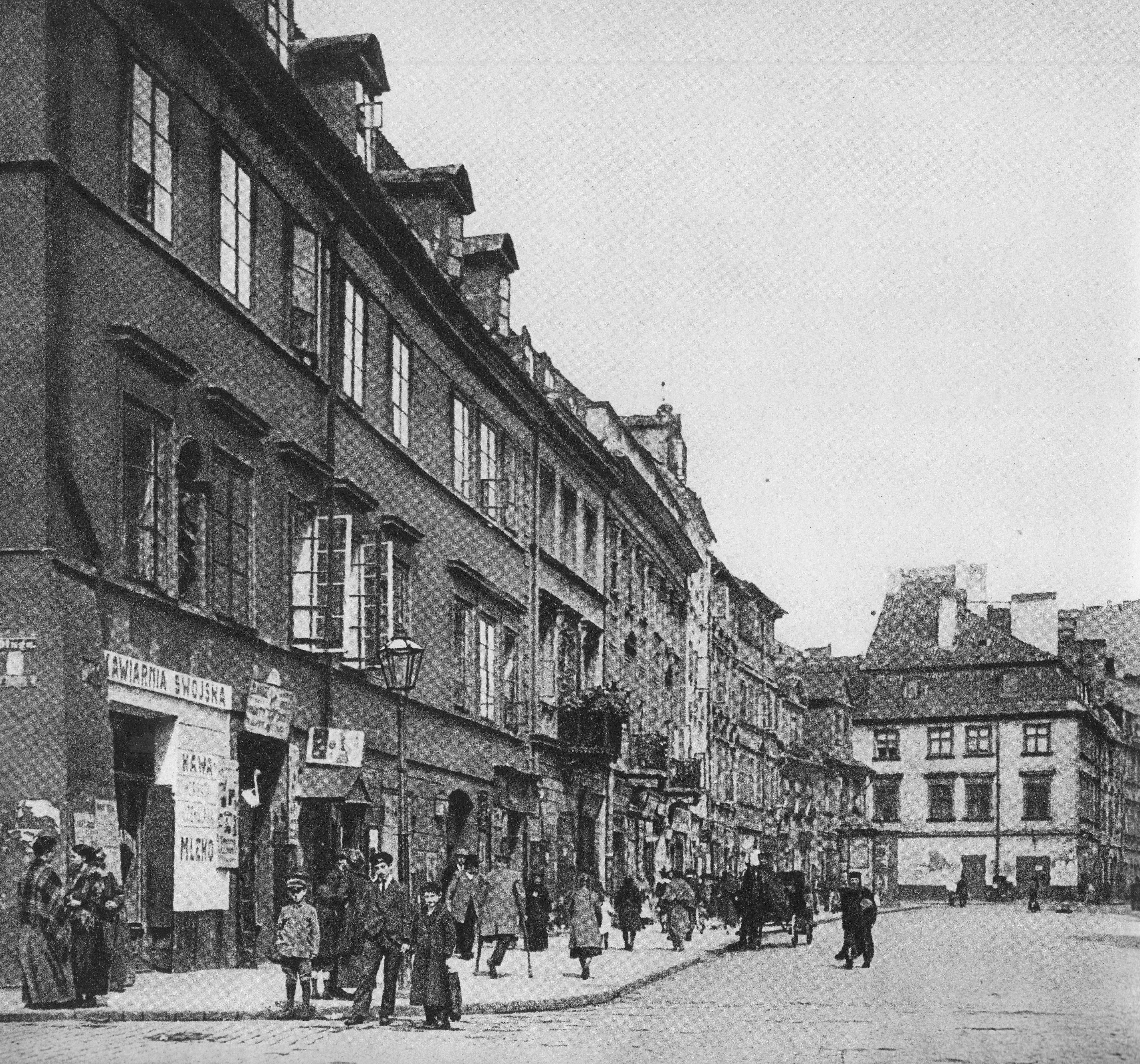 Ulica Freta róg Długiej w Warszawie w okresie międzywojennym